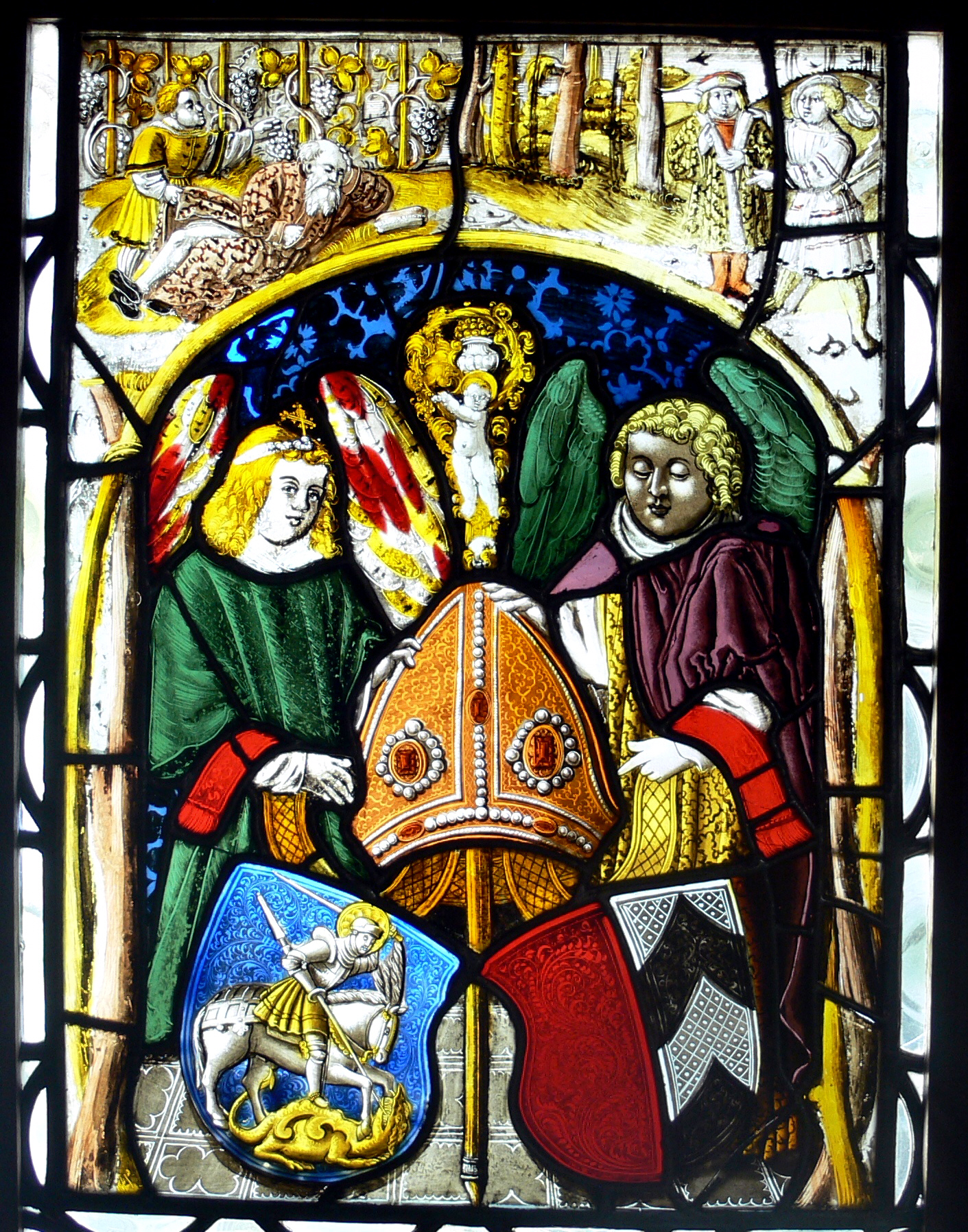 Schaffhausen, Museum zu Allerheiligen Wappenscheibe des David von Winkelsheim, des letzten Abts von St. Georgen in Stein am Rhein, 1516?